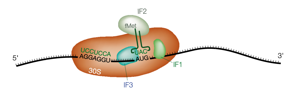 Initiation of protein translation in bacteria. The 30S binds to the mRNA through interaction between the purine-rich Shine-Dalgarno sequence and the 3'-end of the 16rRNA. IF1, IF2 and IF3 participate in proper initiation codon recognition.